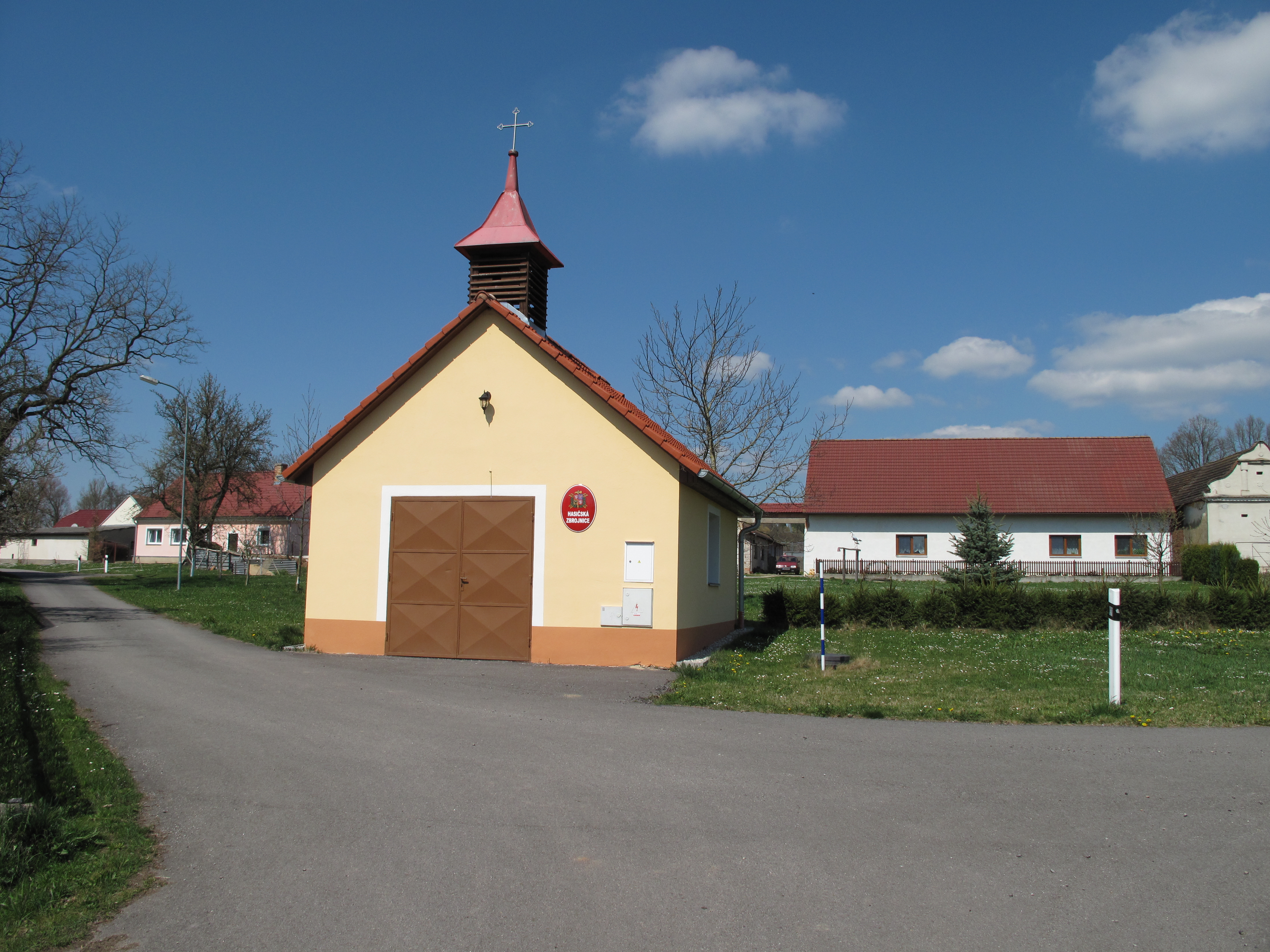 Požární zbrojnice v Soběticích. Okres České Budějovice, Česká republika.